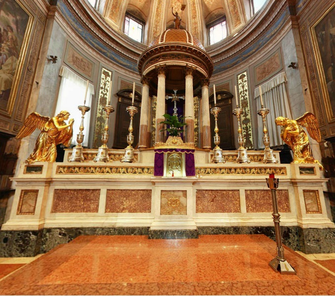 L'altare maggiore della parrocchiale di Corbetta (MI) - Italy